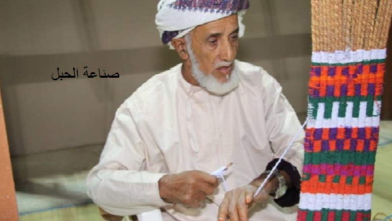 صناعة الحابول